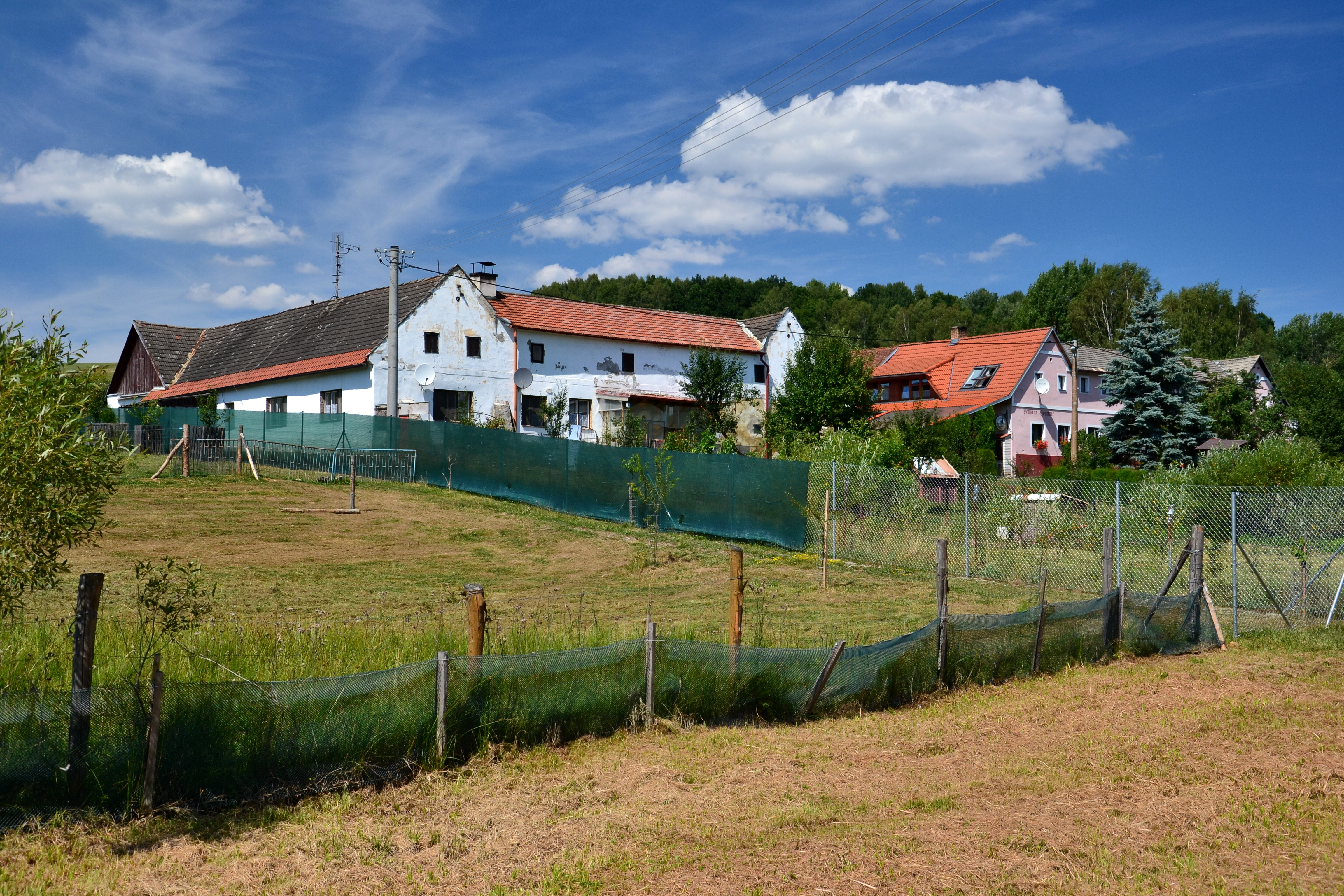 Statky čp. 23 a 46